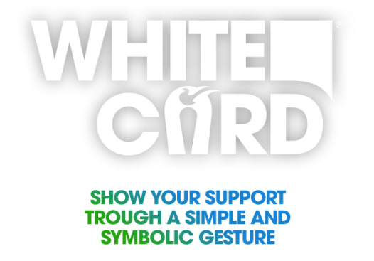 Logo officiel de la Campagne #WhiteCard